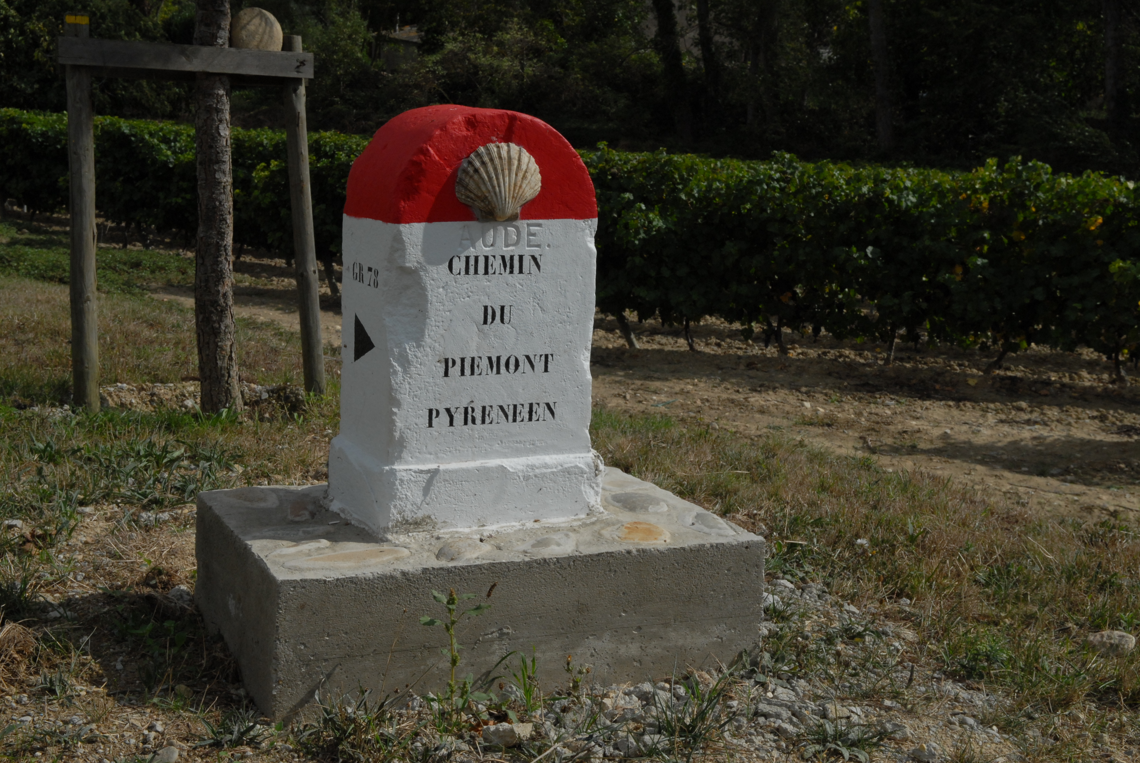 Borne de balisage du chemin de saint Jacques à Alairac(11290)sur le chemin des Castelles au lieu-dit Catufe